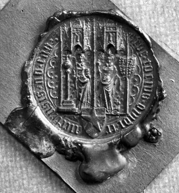 Zegels En Munten: Zegel met twee heren van Maastricht en vijfpuntige stadsster. Links: de bisschop van Luik met Luikse perroen. Rechts: de hertog van Brabant met wapenschild.